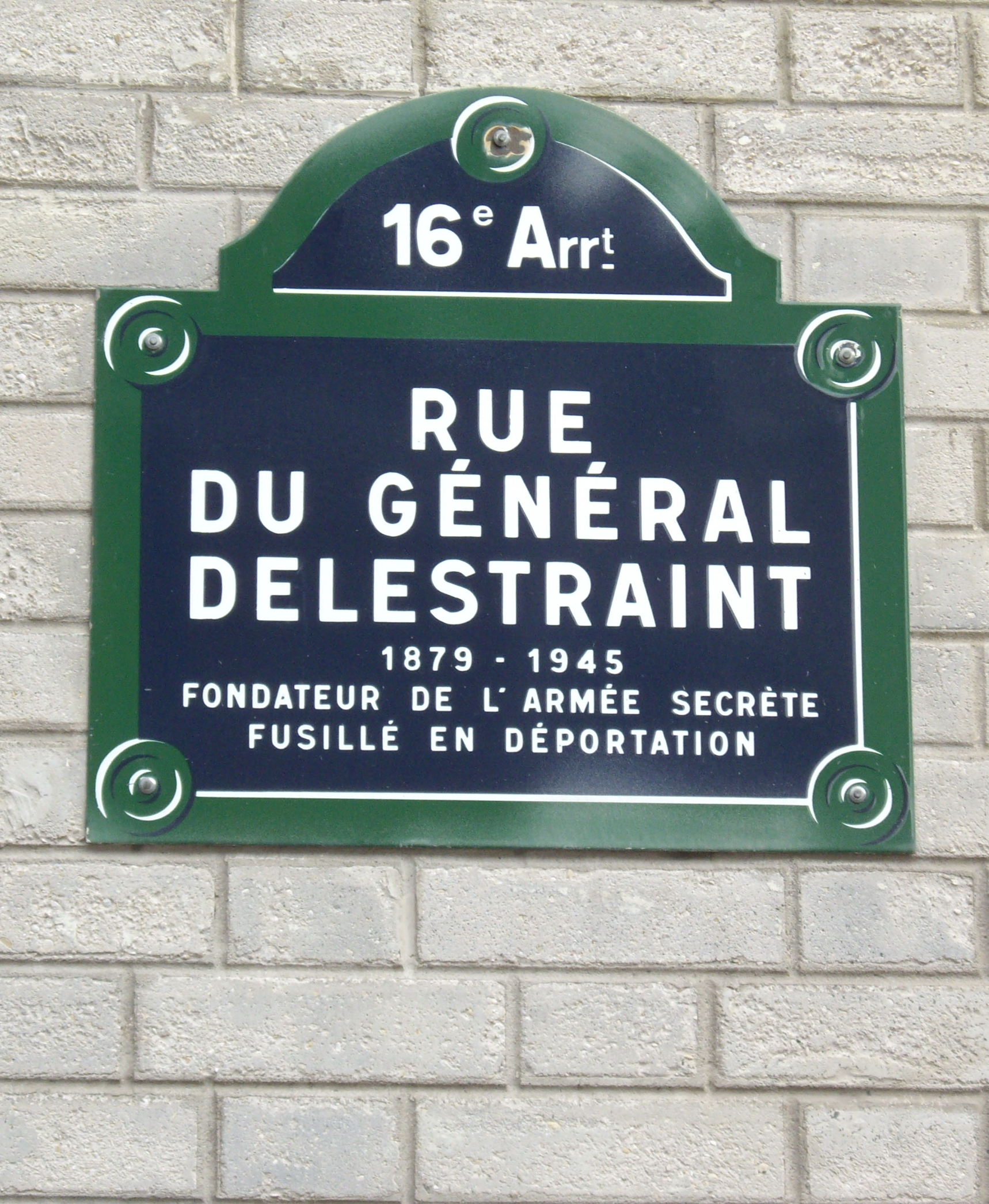 Plaque de la Rue du Général Delestraint, Paris 16e, en mémoire du général Charles Delestraint (1879-1945).